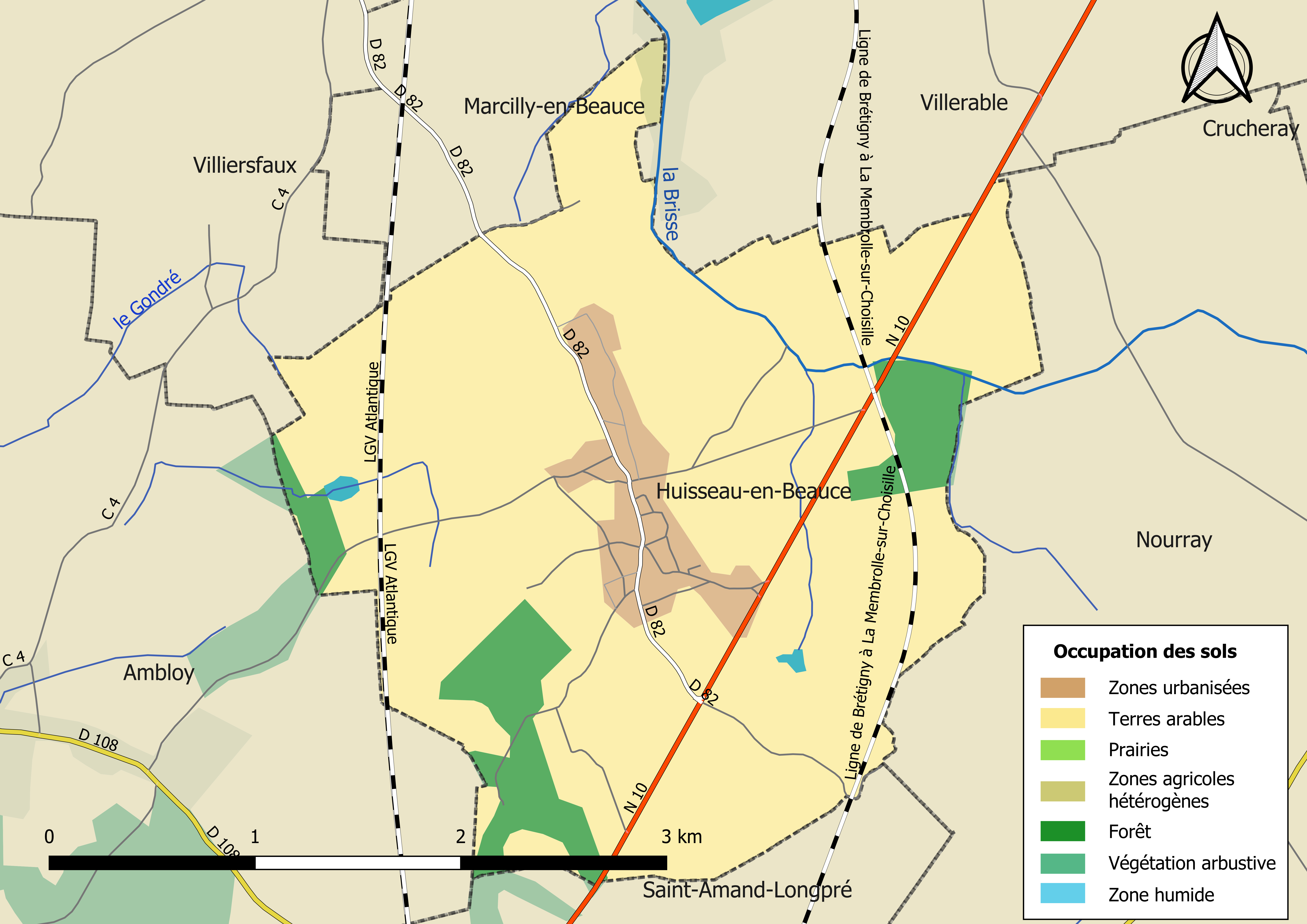 Carte des infrastructures et de l’occupation des sols en 2018 de la commune de Huisseau-en-Beauce (France).